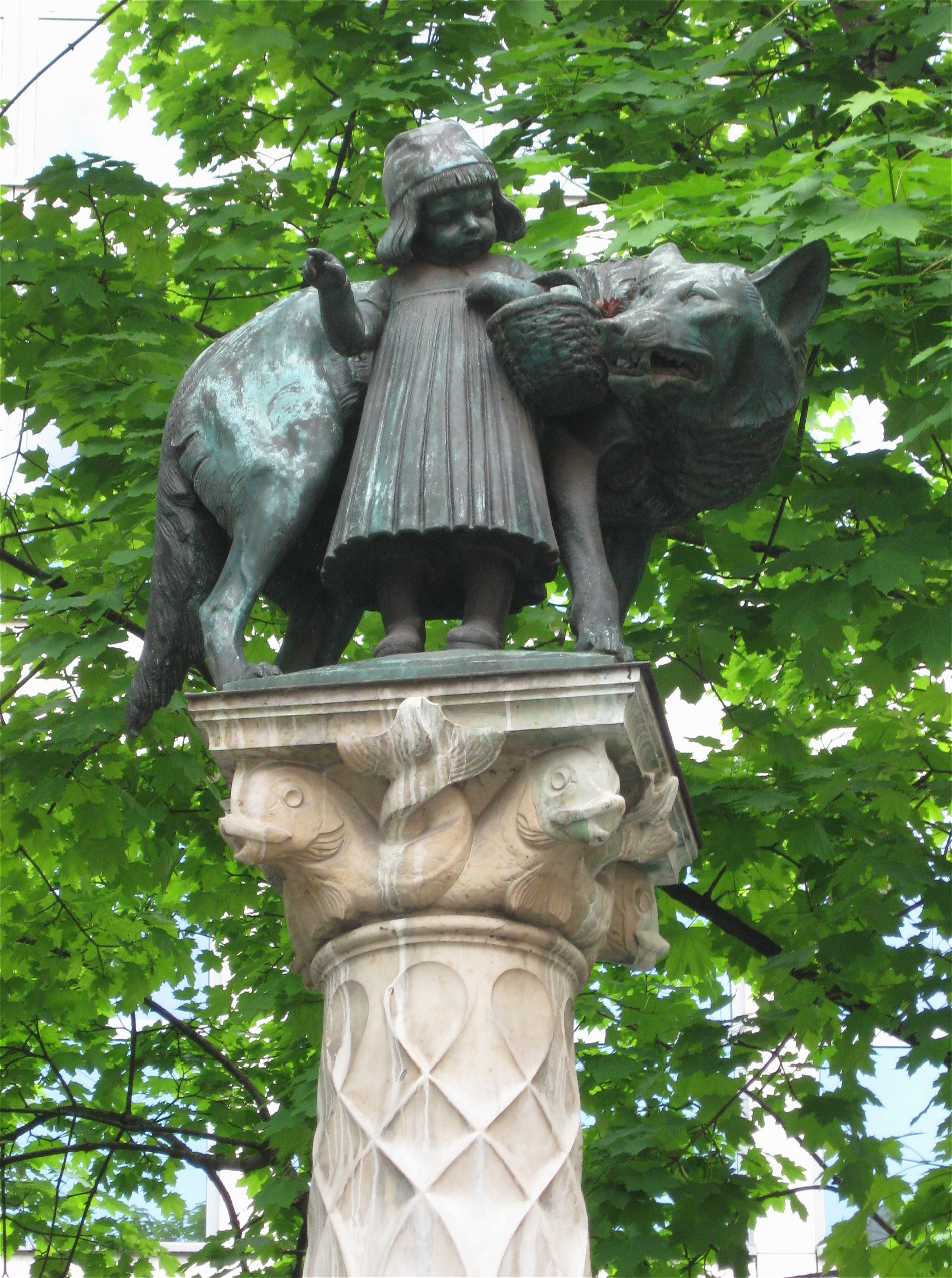 Am Kosttor; Wolfsbrunnen (oder Rotkäppchenbrunnen), 1904 von Heinrich Düll und Georg Pezold; in Platzmitte